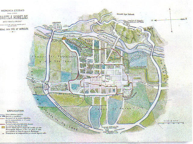 Flag Of Morelos